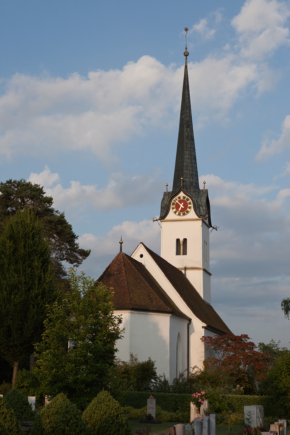 Reformierte Kirche in Aarwangen (BE). Von Johann Daniel Osterrieth (* 9. Oktober 1768 in Straßburg, Elsass; † 25. Juli 1839 in Bern) war ein Architekt des Klassizismus. Er war Berner Stadtbaumeister.